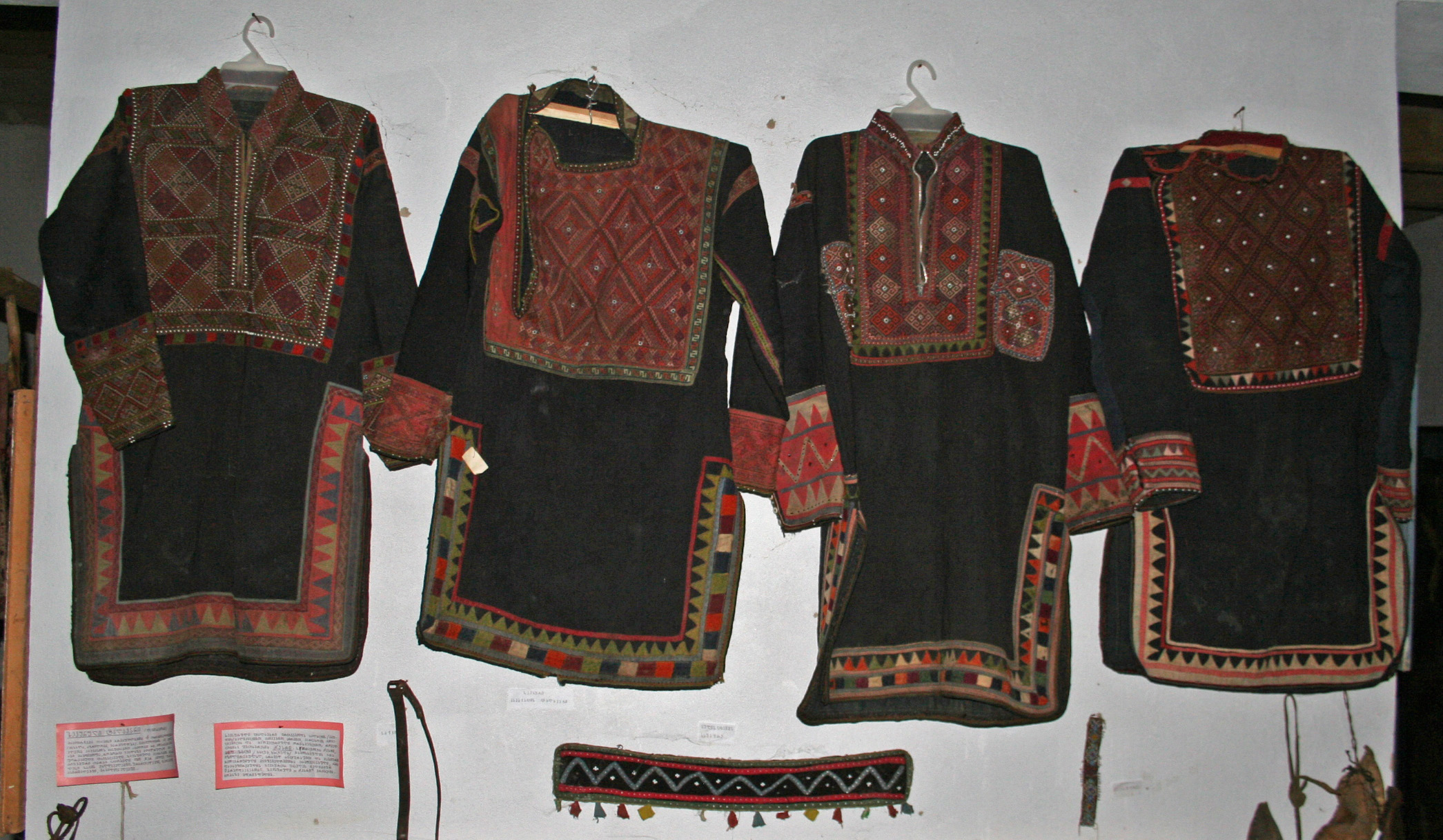 Georgische Trachten